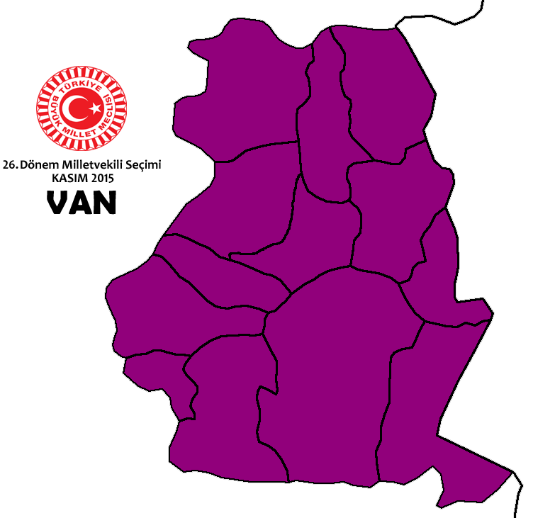 Kasım 2015 Seçimleri